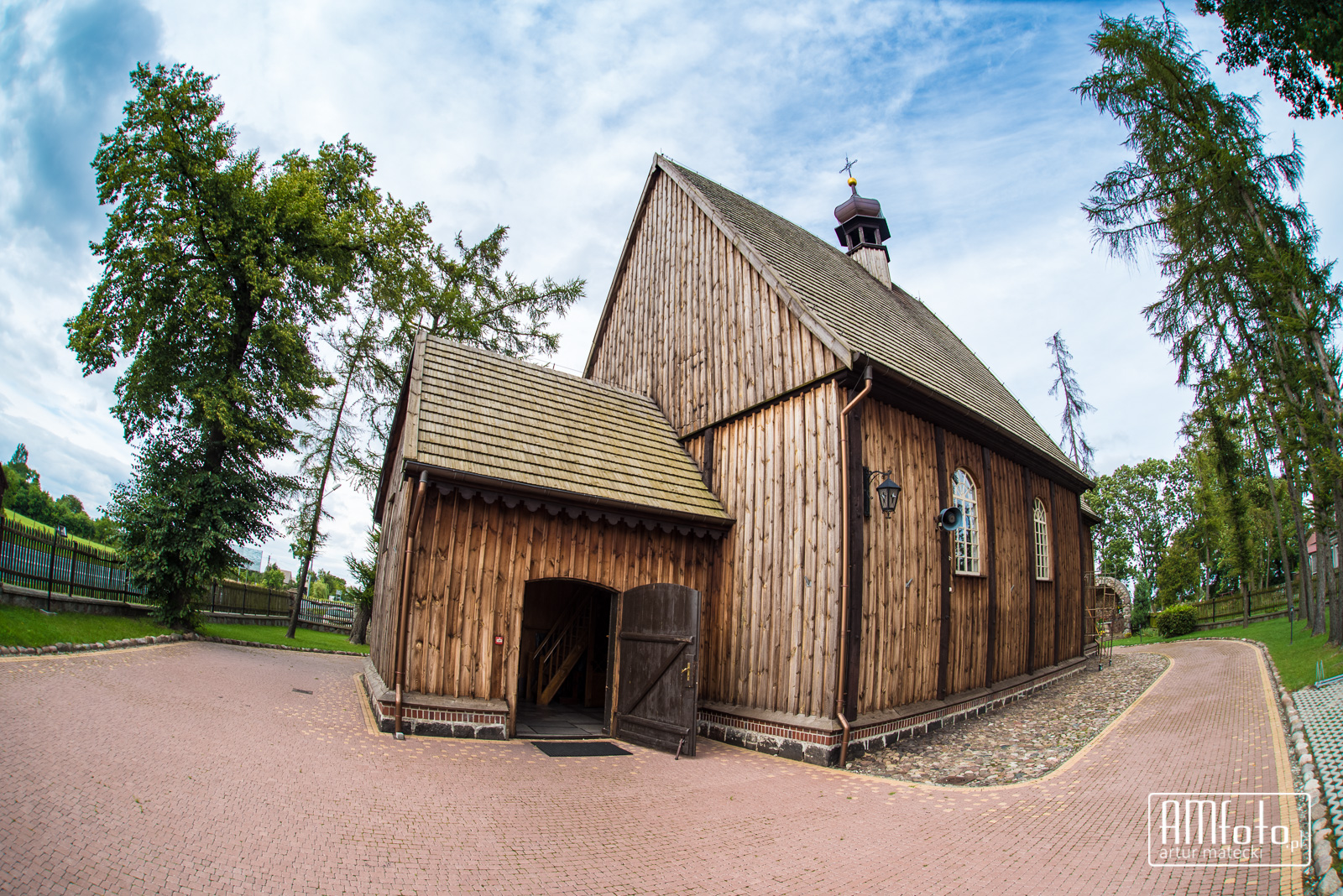 Parafia św. Michała Archanioła w Szczurach - stan na 2017r autor: Artur Matecki